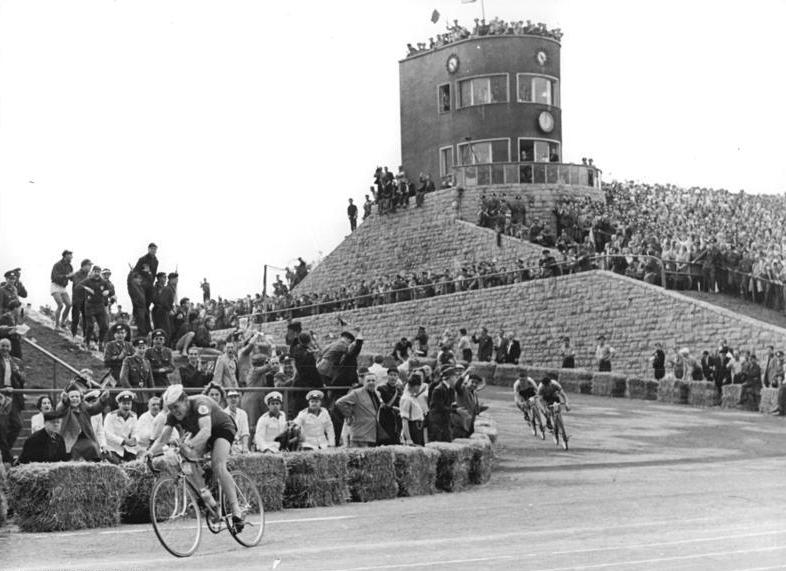 Friedensfahrt, Magdeburg, Stadioneinfahrt ADN-ZB Kollektiv Za-Schm 16.5.1960 - XIII. Friedensfahrt 1960 - 13. und letzte Etappe. Am 16.5.1960 von Magdeburg nach Berlin über 182 km. Erich Hagen (DDR) holte sich diesen Etappensieg und damit das gelbe Trikot. Es blieben somit das gelbe und die blauen Trikots von der ersten Etappe bis zur letzten im Besitz der DDR-Mannschaft. UBz: Erich Hagen (DDR) fährt vor Gazda (Polen) und Covens (Belgien) als erster im Walter-Ulbricht-Stadion ein.